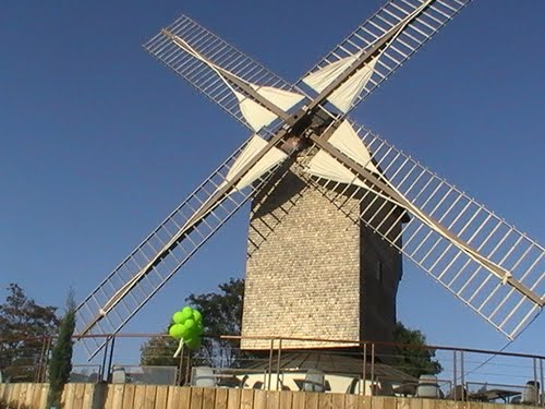 Une photo du moulin de Sannois après sa rénovation